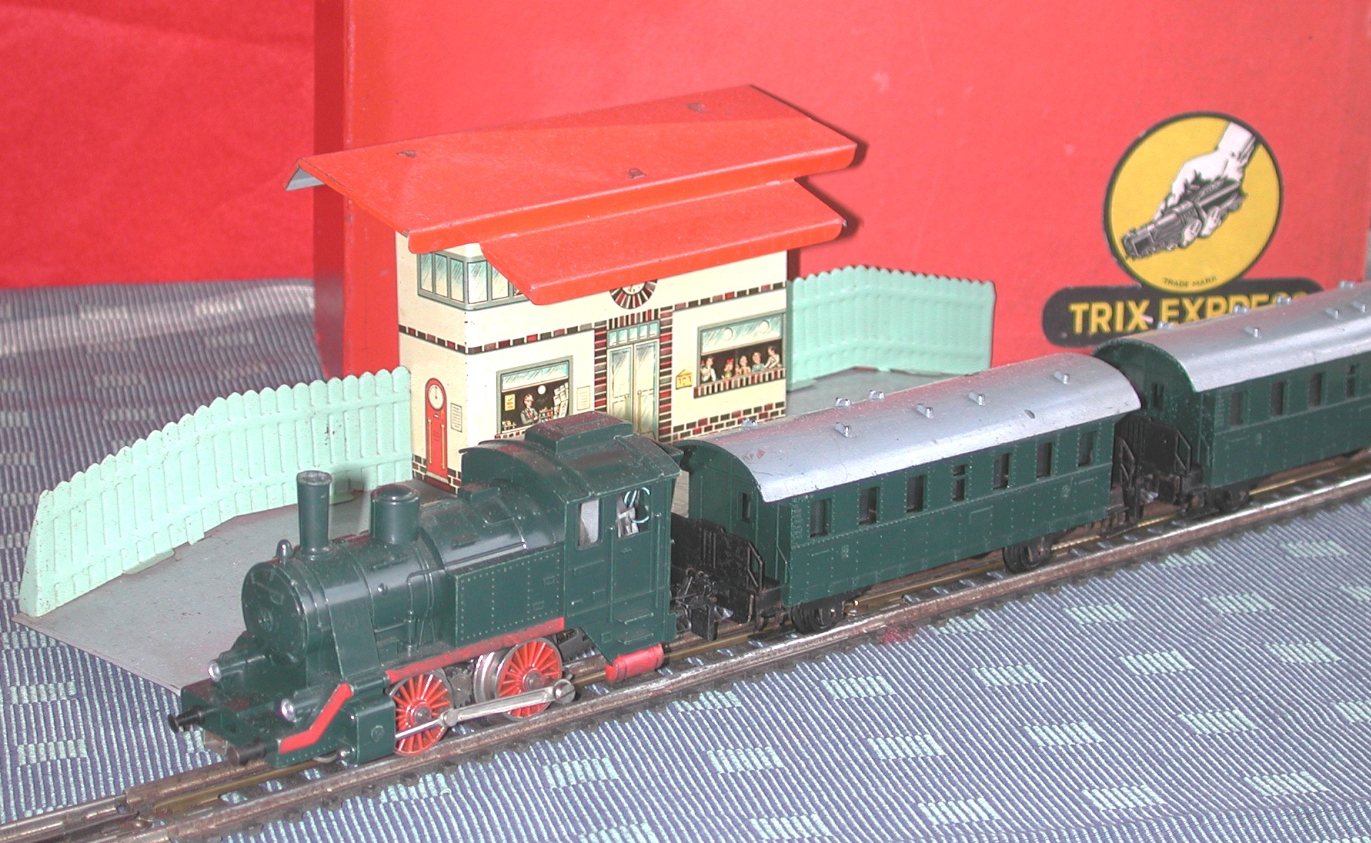 Trix Batteriezug TE 501 - letzte Variante dieser Serie mit grüner Dampflok, hergestellt im Jahr 1960. Bereits im darauffolgenden Jahr wurden die Batteriebahnen aus dem Warenangebot der Firma Trix entfernt.